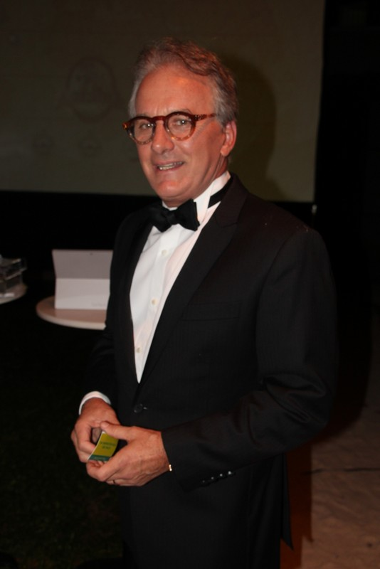 7 - Otavio Mesquita-001